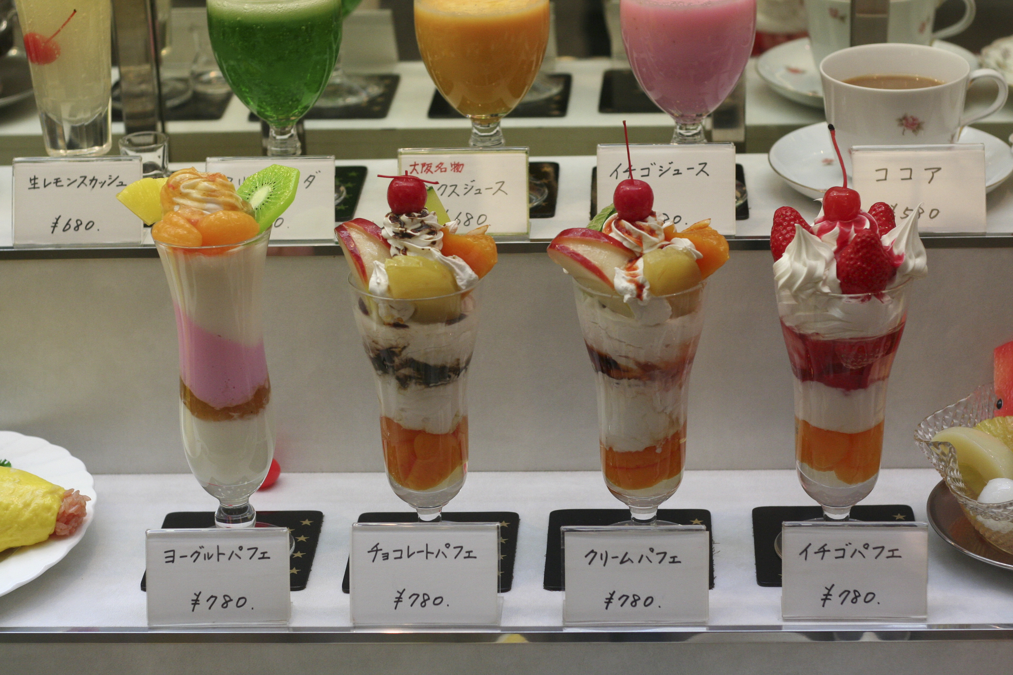 パフェの食品サンプル(大阪市中央区）